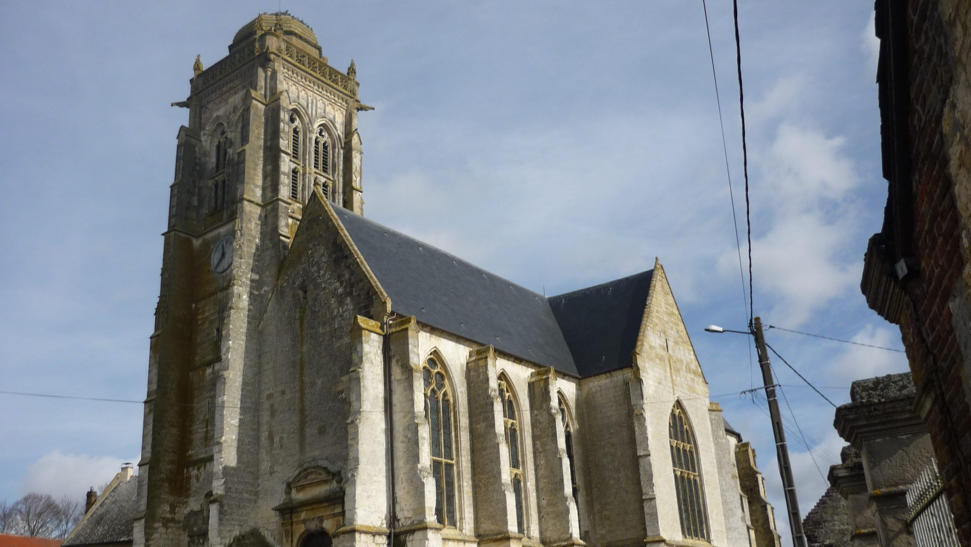 Eglise Saint-Martin de Montigny, située sur la commune de Maignelay-Montigny (Oise, 60), classée sur la liste des Monuments Historiques de France, depuis le 15 août 1919 (PA00114735)